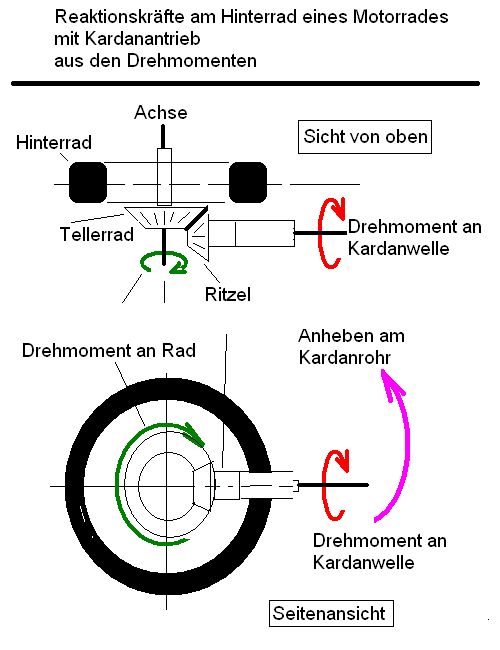 Drehmomente, Reaktionen am Kardanantrieb eines Motorrads.